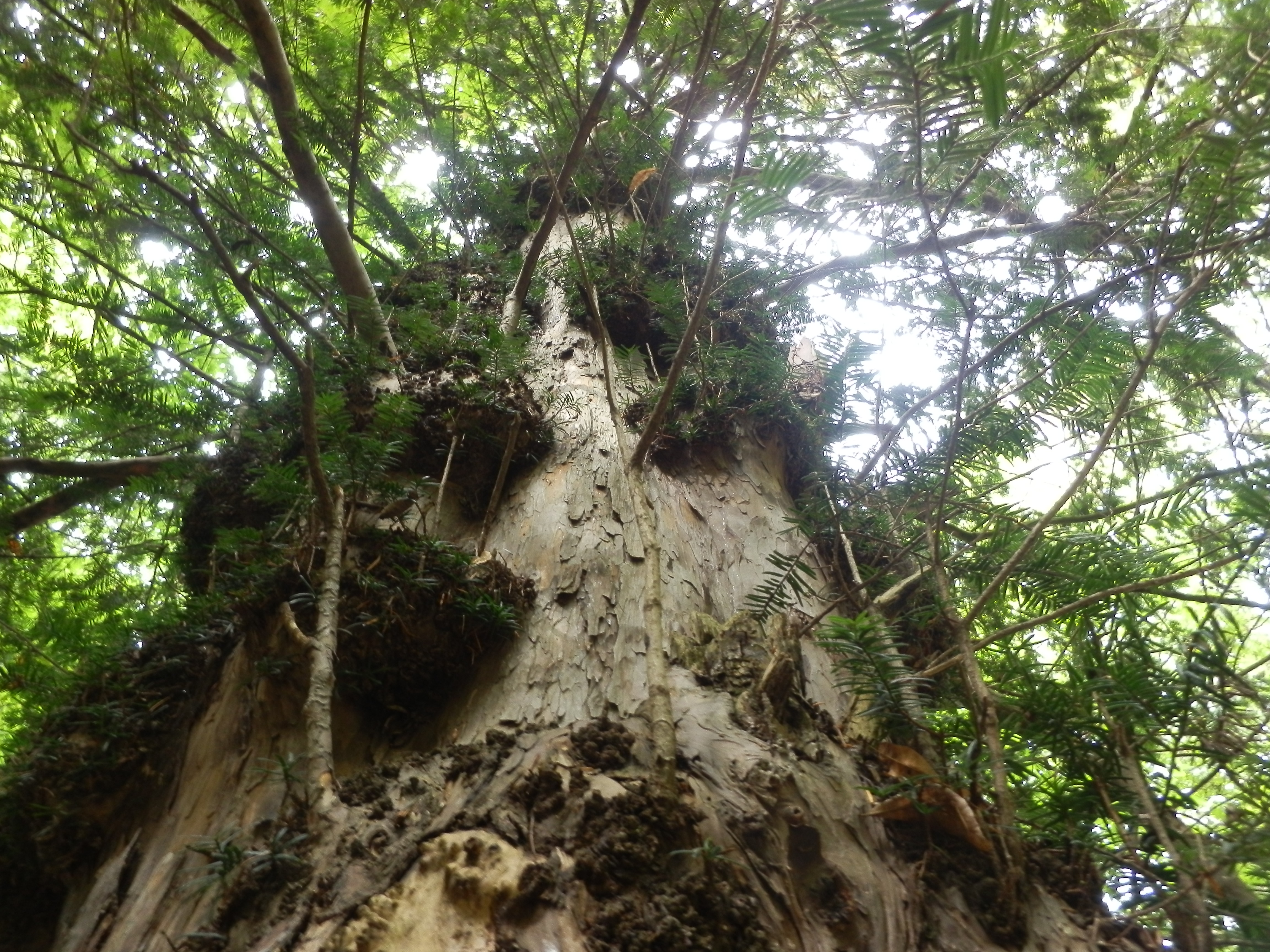 Կենի հատապտղային - Մշտադալար ծառ է, մինչև 25 մ բարձրության, կարմրամոխրագույն բնով մինչև 1 մ տրամագծով, հարթ կամ թիթեղիկավոր: Տերևները՝ 5–8 տարի պահպանվող, երկարանշտարաձև, տափակ, ելուստային ջղերով, սուր, կարճ կոթուկով, փայլուն: Հատապտուղը՝ վառ կարմիր: Բույսը թունավոր է, պարունակում է տաքսին ալկալոիդ, հատապտուղը ուտելի է, սակայն կորիզը նույնպես թունավոր է։ Աճում է շատ դանդաղ, տարեկան մոտ 2-3 սմ, ապրում 1-3 հազար տարի։ Ամենամեծը Հայաստանում (25 մ) գտնվում է Տավուշի մարզի Աղավնավանք գյուղի մոտակայքում գտնվող Կենու պուրակում։ Գրանցված է Կարմիր գրքում։